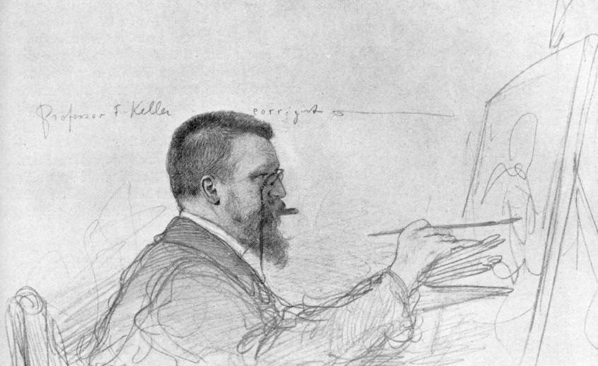 Ferdinand Keller (1842-1922), German painter